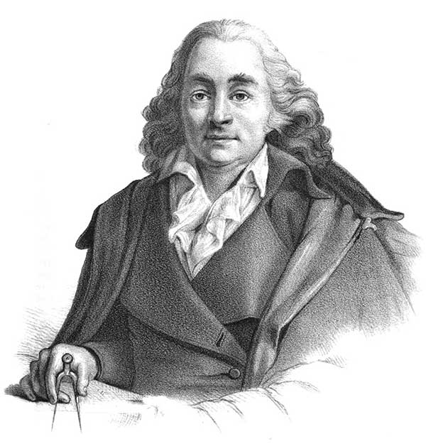 Louis Jean Desprez (1737-1804)